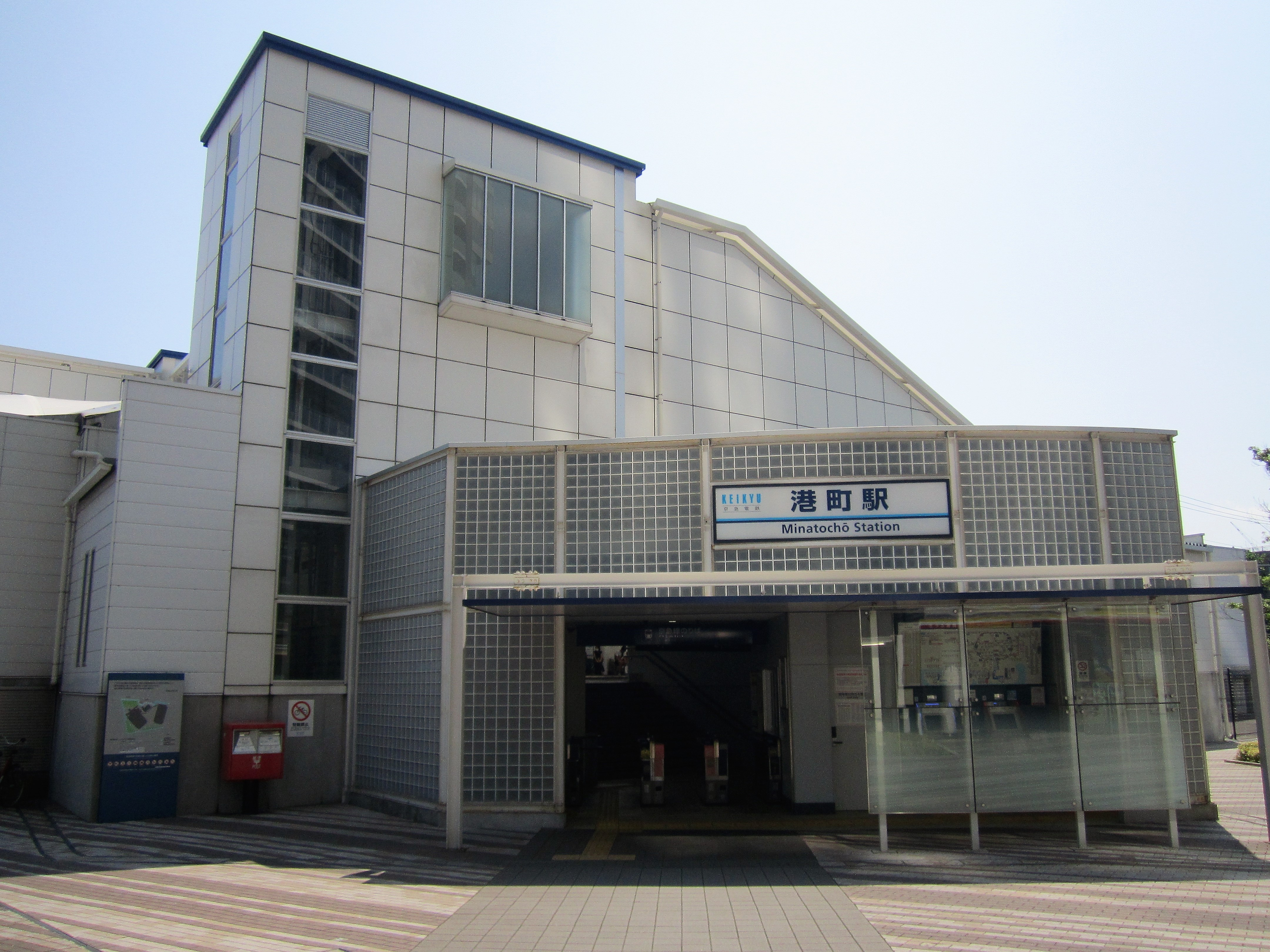 京急大師線 港町駅北口